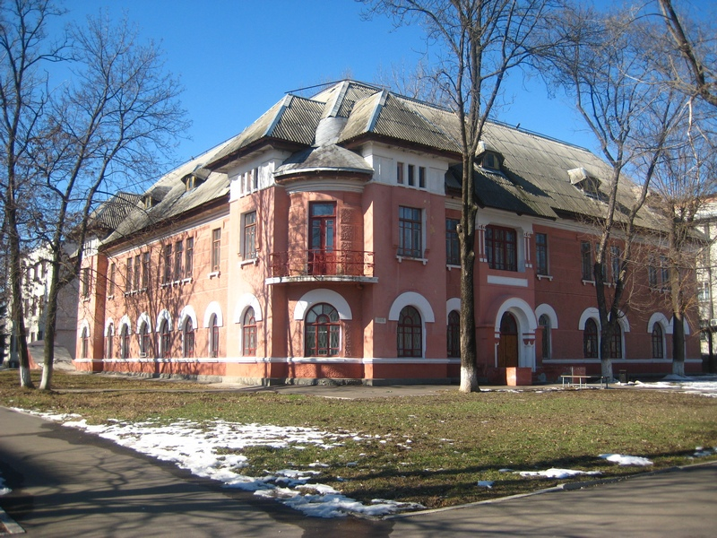 Бывшая частная больница архитектора Бенедикта Мульмана.